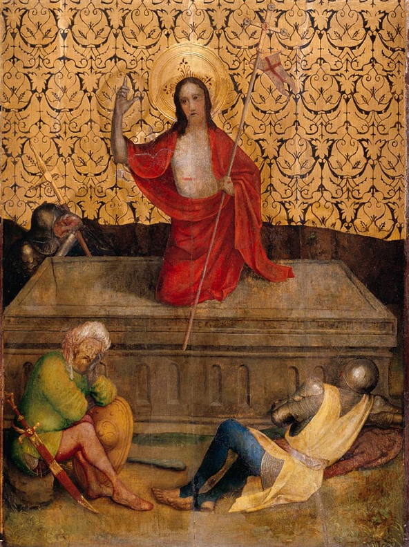 Résurrection du retable d'Heisterbach